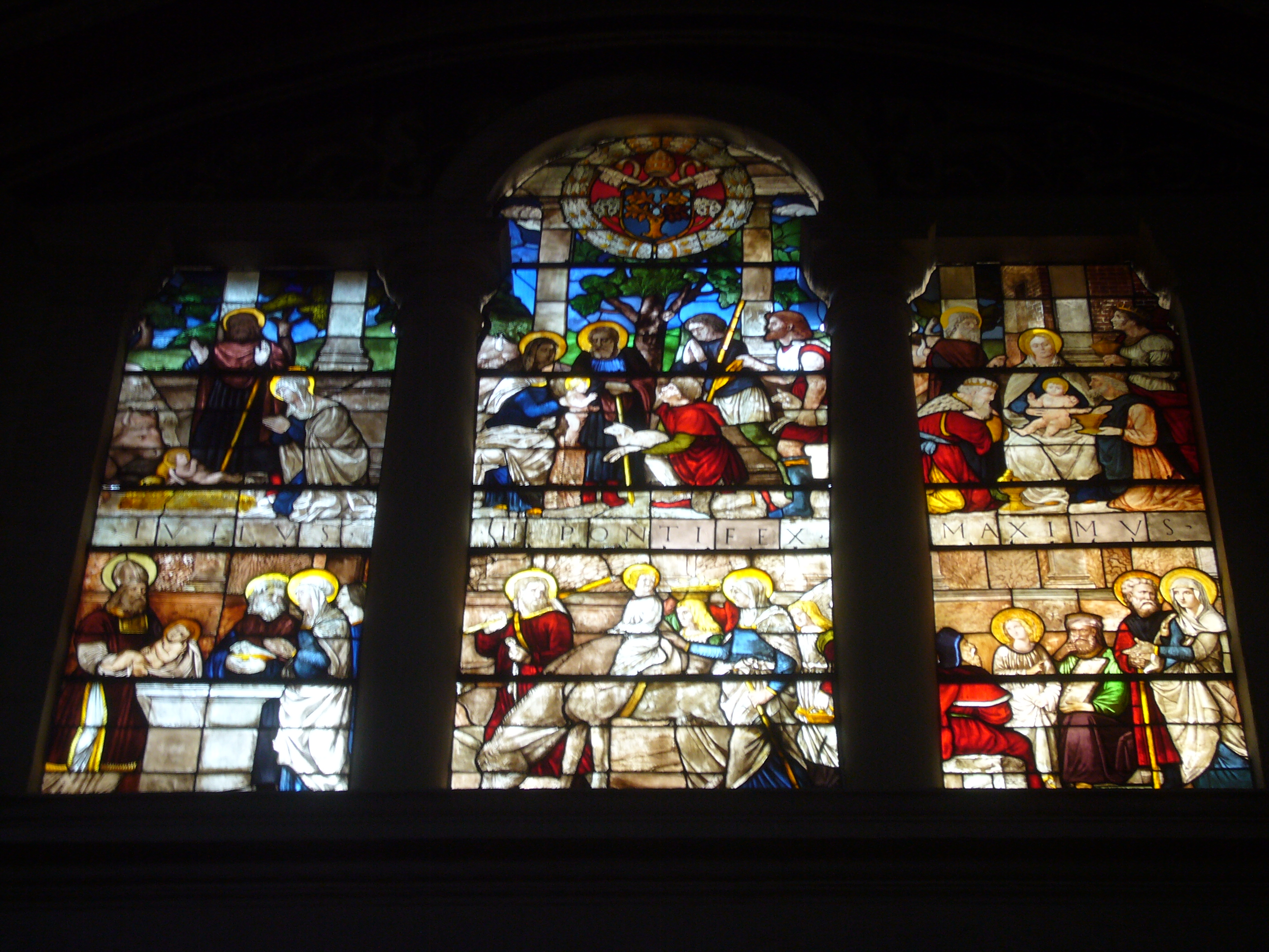 Roma, santa Maria del Popolo. Vetrata di Guglielmo de Marcillat (destra)